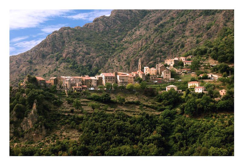 Corsu: U Castellà di Mercuriu